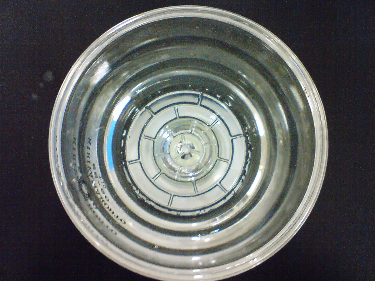 上からみた桐山ロート。